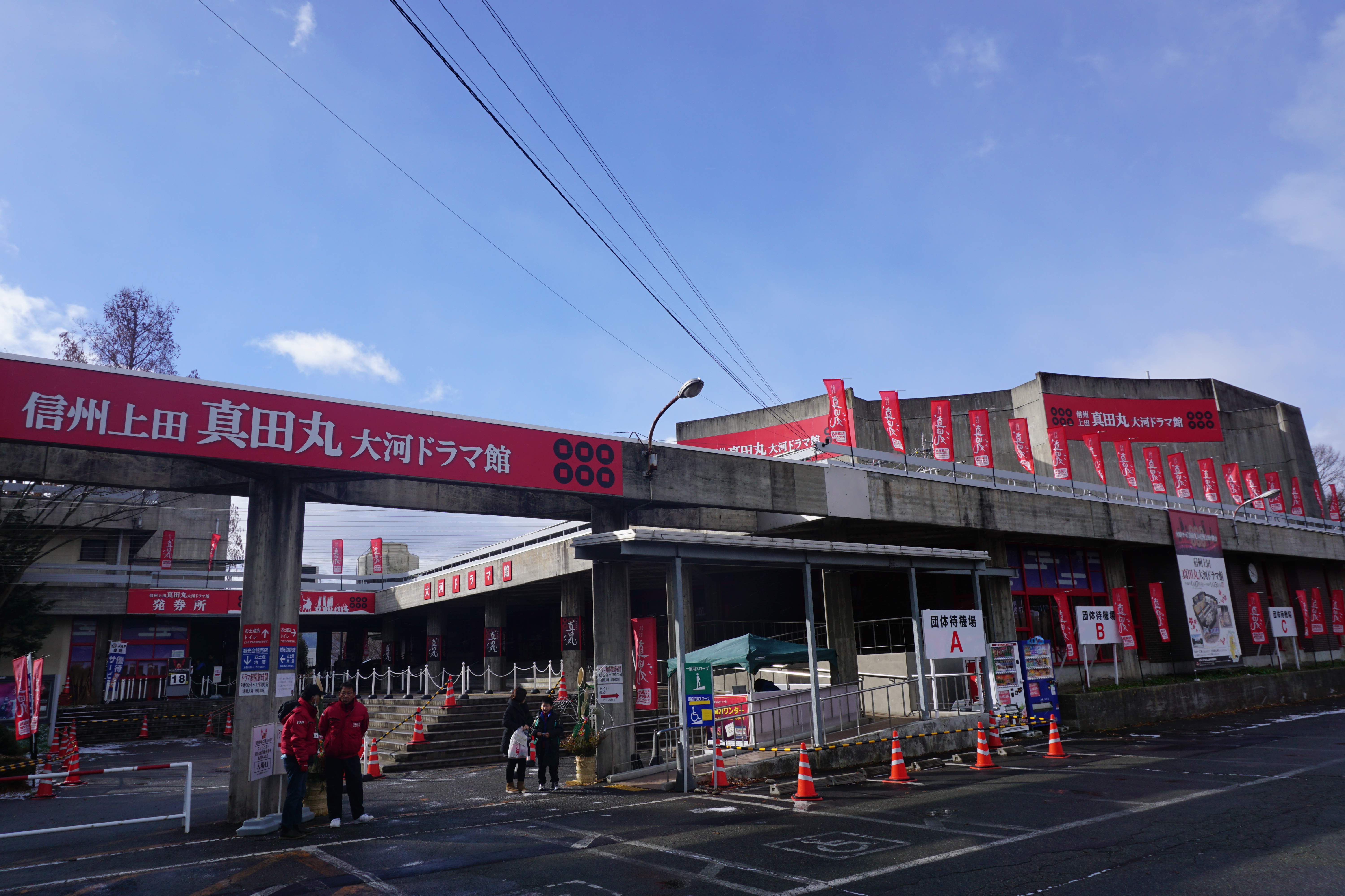 真田丸大河ドラマ館（真田丸 (NHK大河ドラマ)参照）